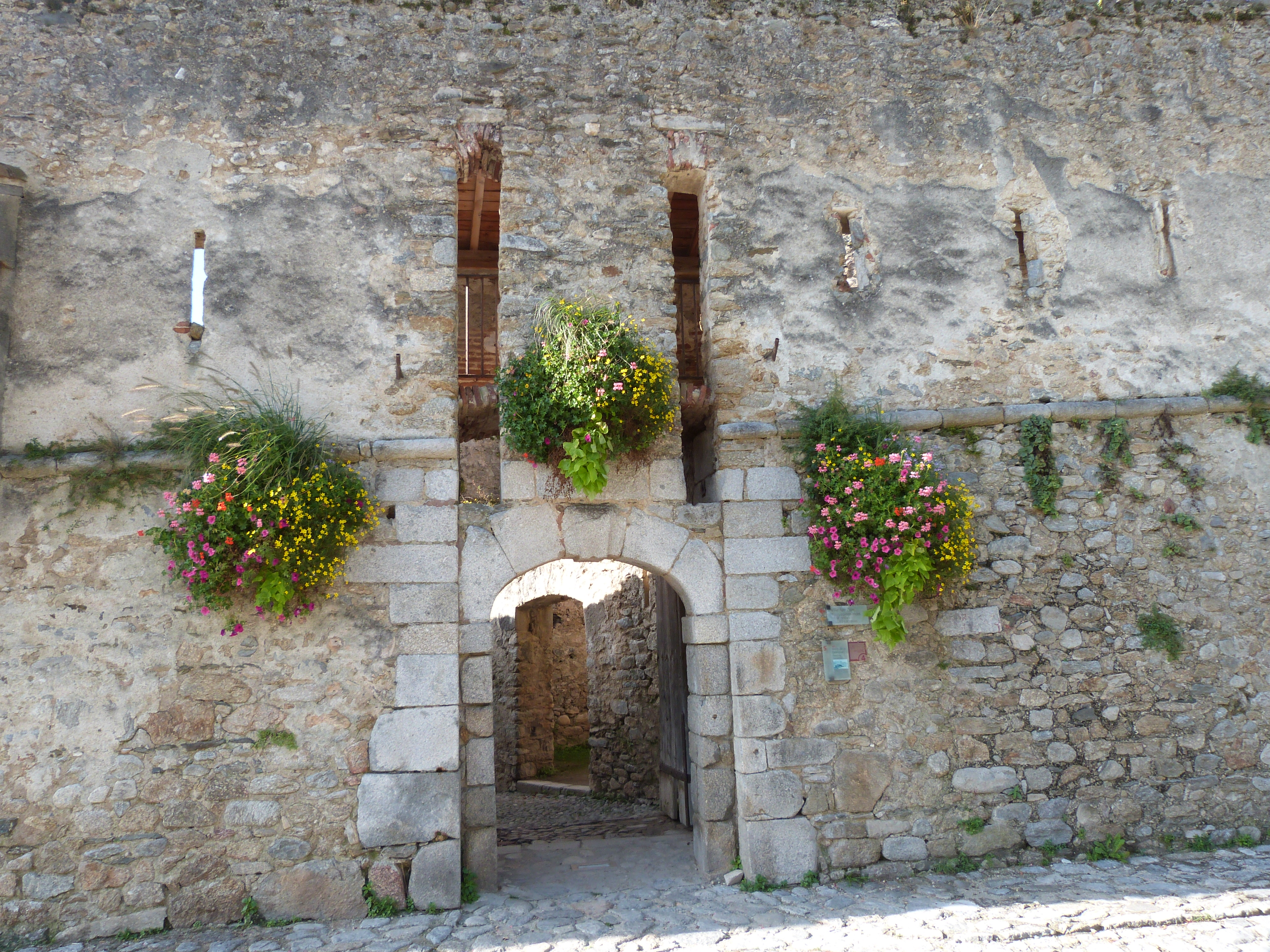 Remparts de Prats-de-Mollo-la-Preste